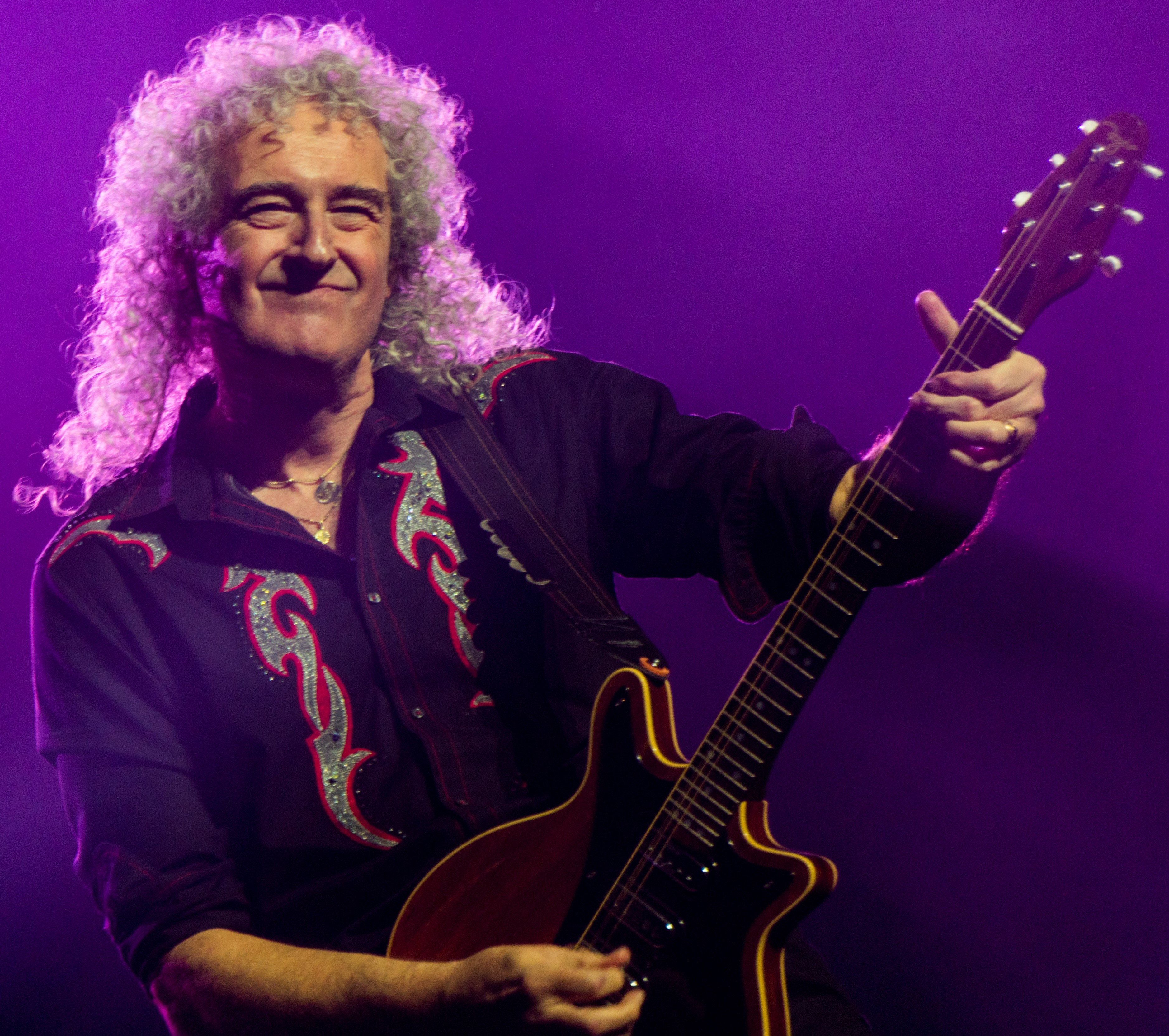 QueenO2121217-4